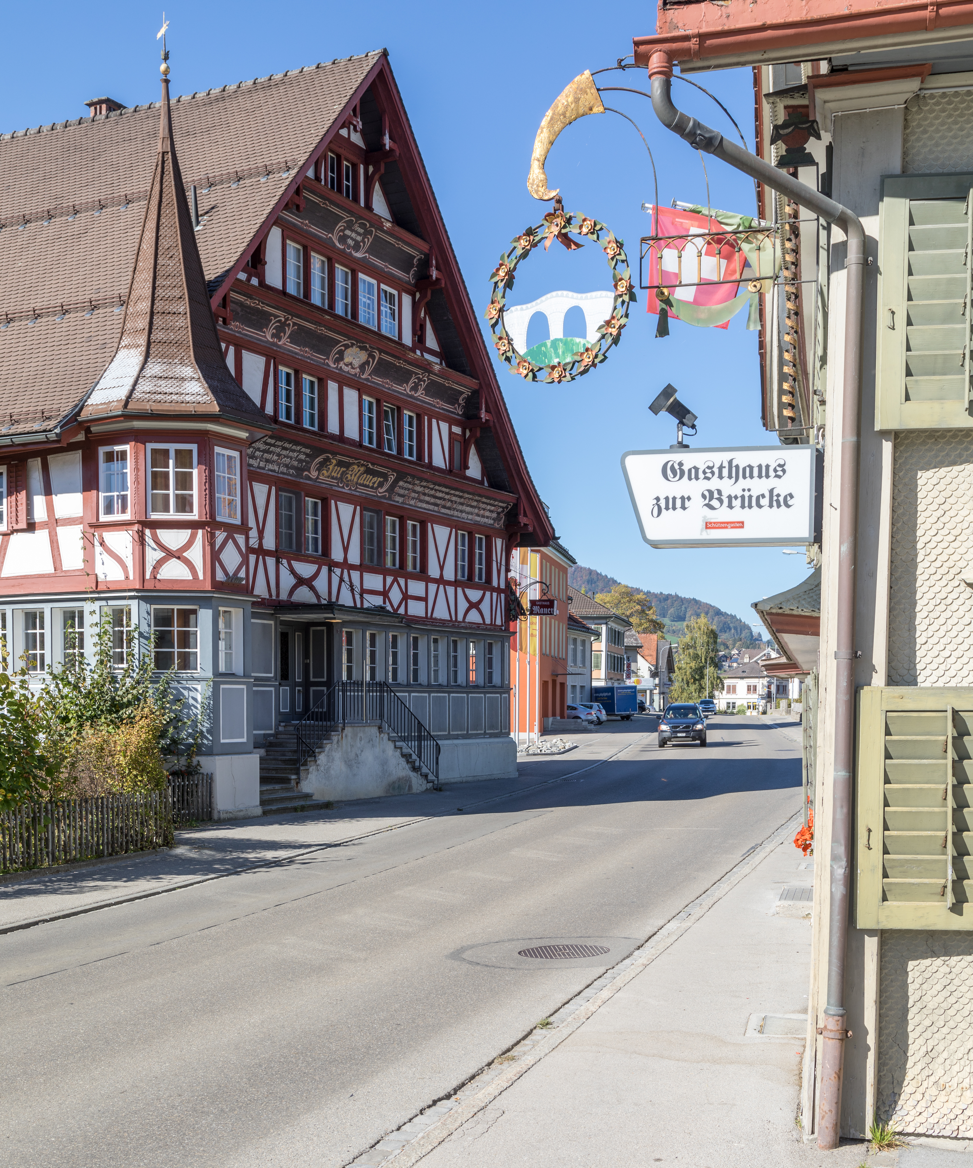 Gasthäuser an der Toggenburgerstrasse in Neu St. Johann, Kanton St. Gallen.